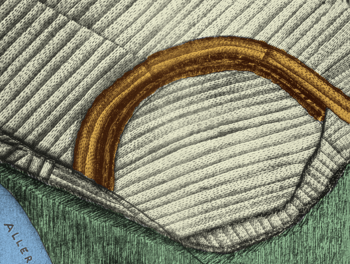 Zeichnung der Alten Burg Verden mit Wall, bestanden mit Getreidefeldern, am Rande der Allerniederung, nachkoloriert